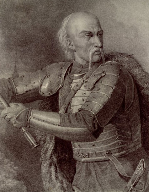 Jan_Pawel_Sapieha 1609-1665